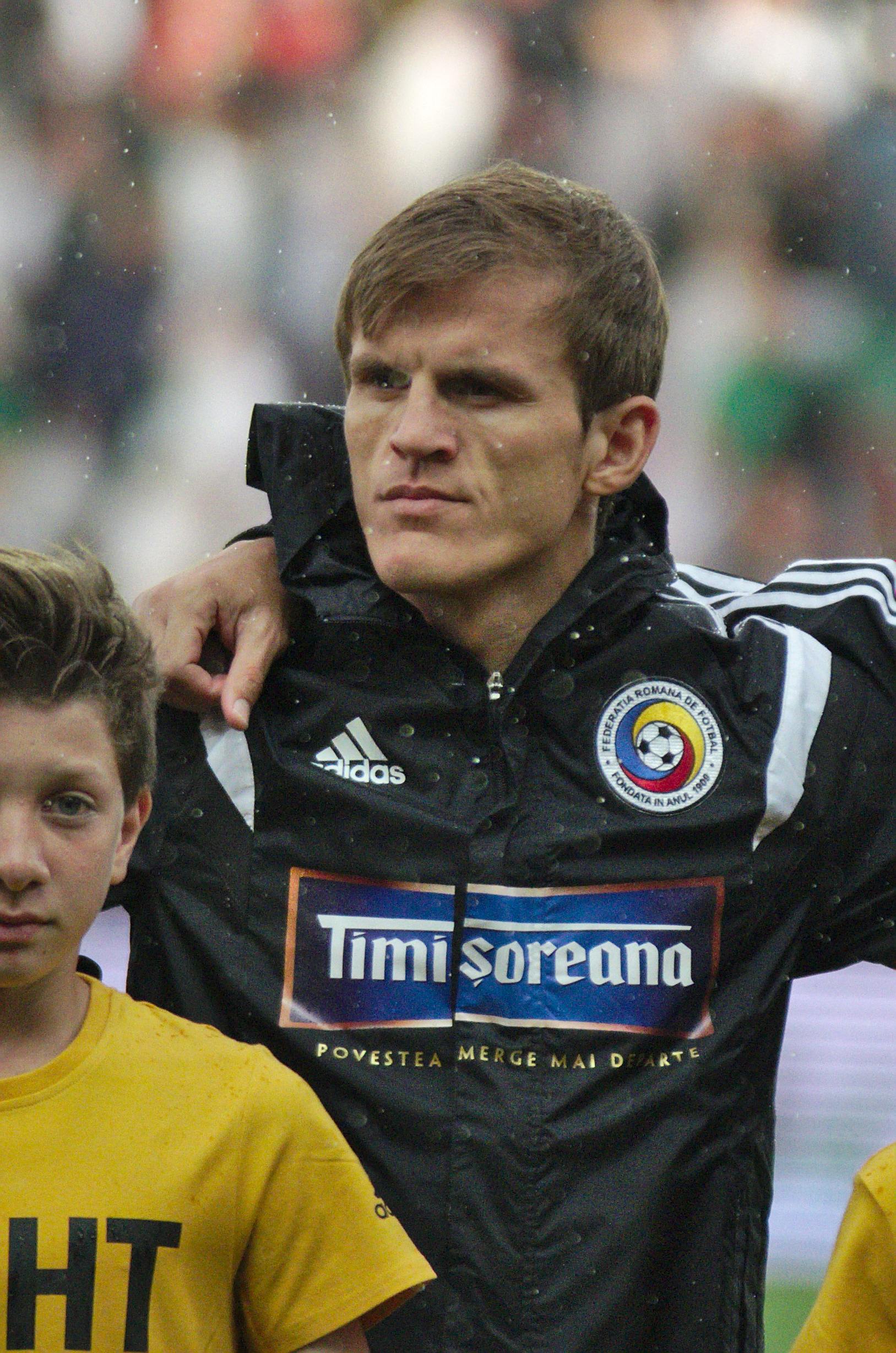 Algérie-Roumanie - 20140604 - Constantin Lazăr